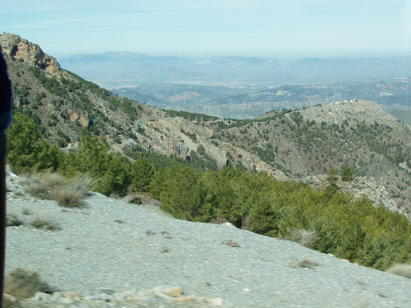 Sierra Nevada España (Spain). Barranco del Castillejo